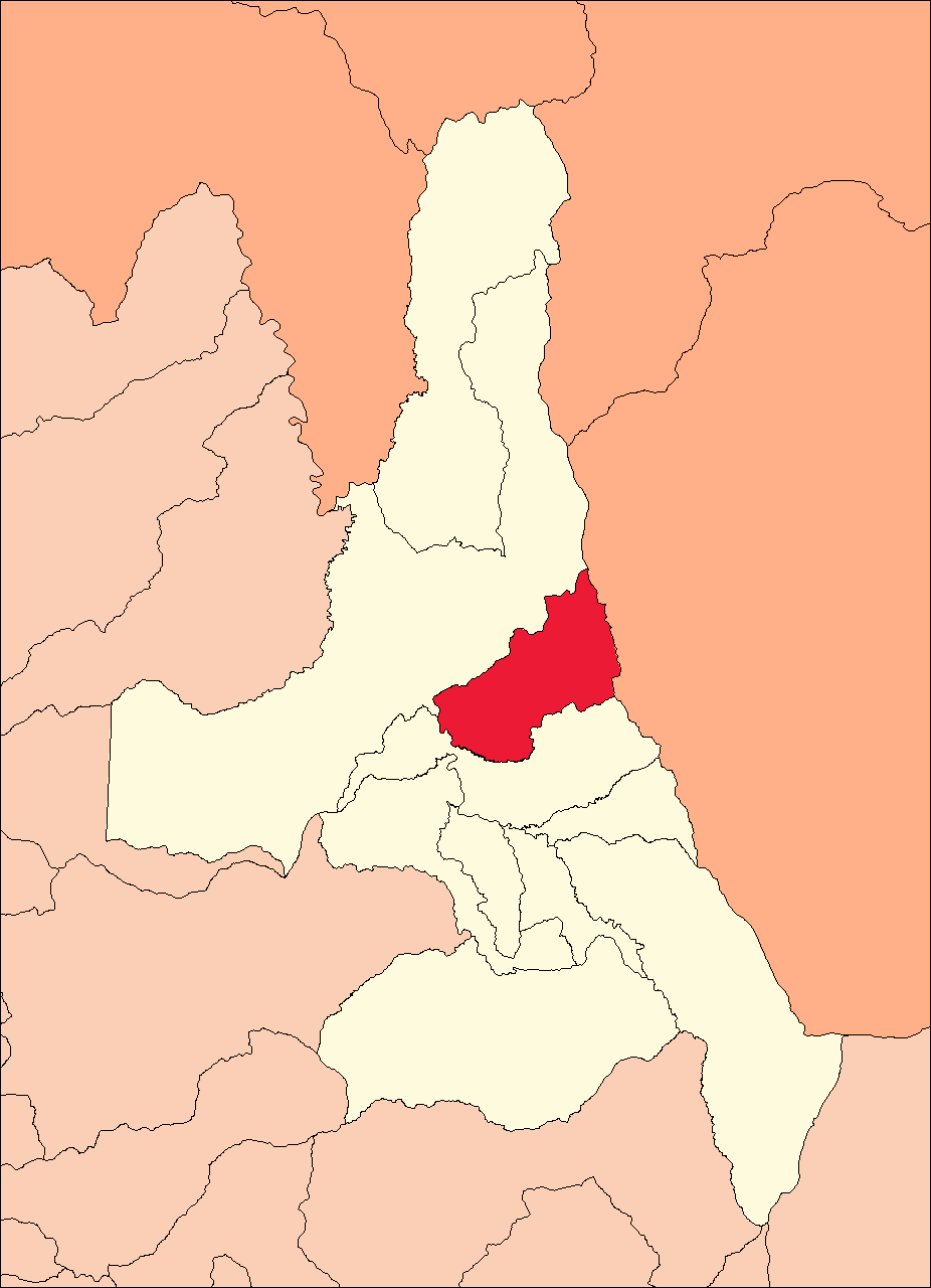 Área del distrito de Santo Domingo de Anda.